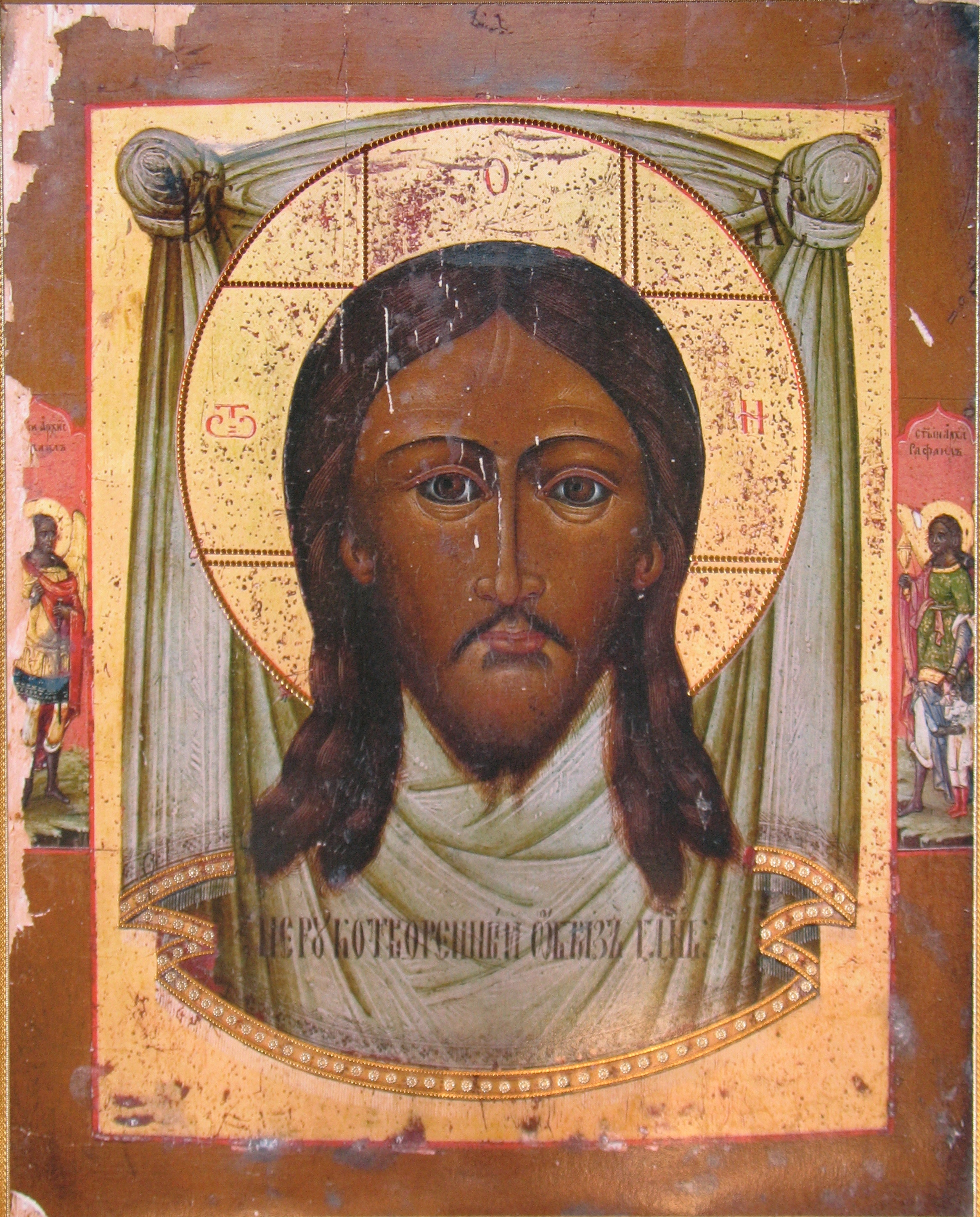 Обновившаяся 20 июля 1997 года икона Спаса Нерукотворного (Водяное, Змиевской район, Борисоглебский монастырь). Репродукция иконы: нимб (слава) выполнен по периметру золотом. Слева на полях изображён С(вя)тый Архис(тратиг) Михаил, справа - С(вя)тый Арх(анге)л Рафаил.